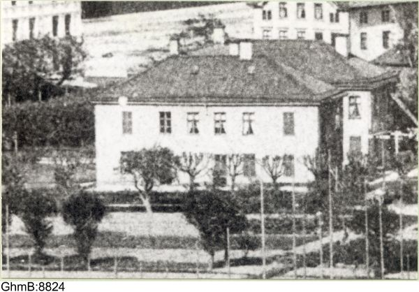 Homeyerska huset, senare efter annan ägare benämnt Möllerska plantaget. Inrättade till epidemisjukhus vid kolerand utbrott i Göteborg år 1834, i vilken egenskap det tjänstgjorde till 1885* då det nya vid Änggården öppnades. Byggnaden brändes senare ned.